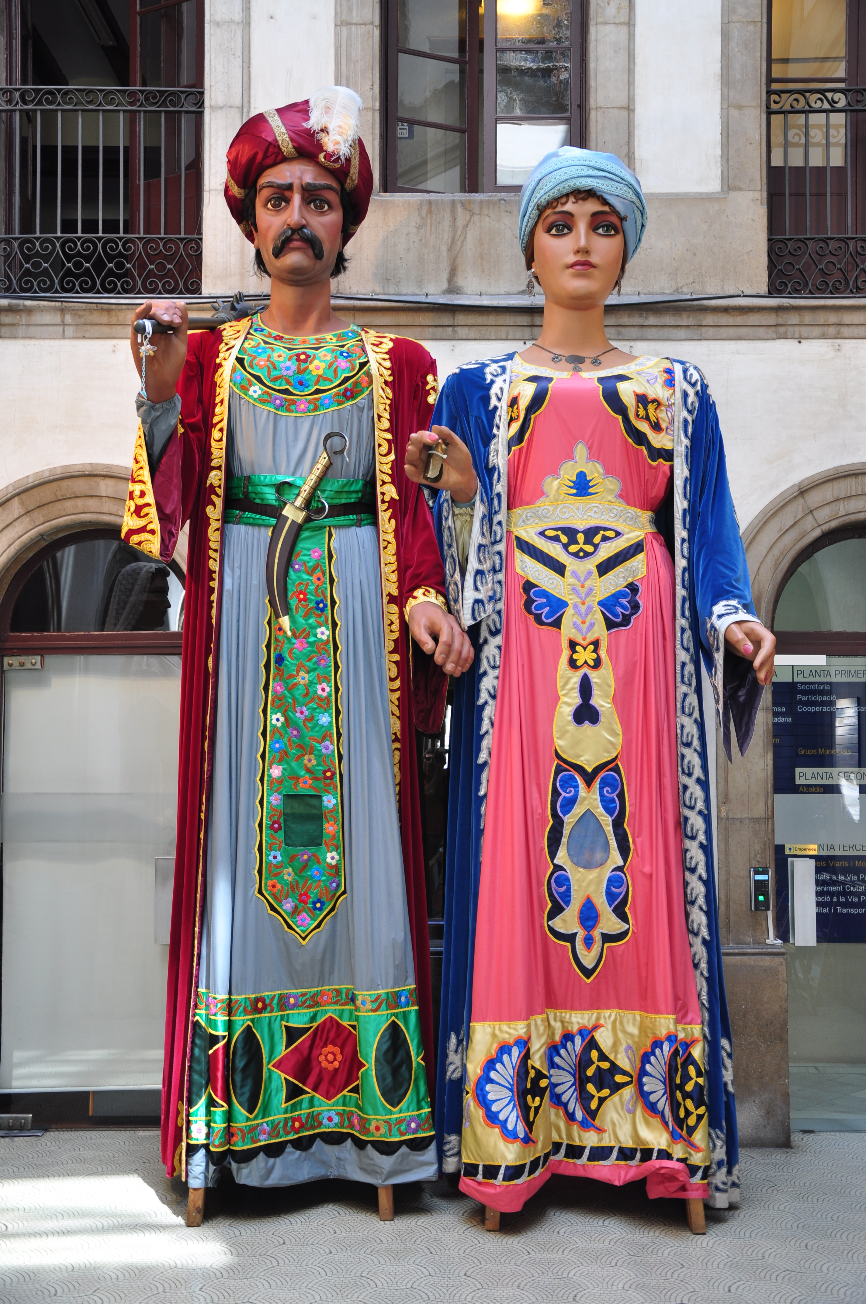 Gegant de la Porra: 4,75 m. 110 Kg. Geganta gran: 4,55 m 90 Kg.